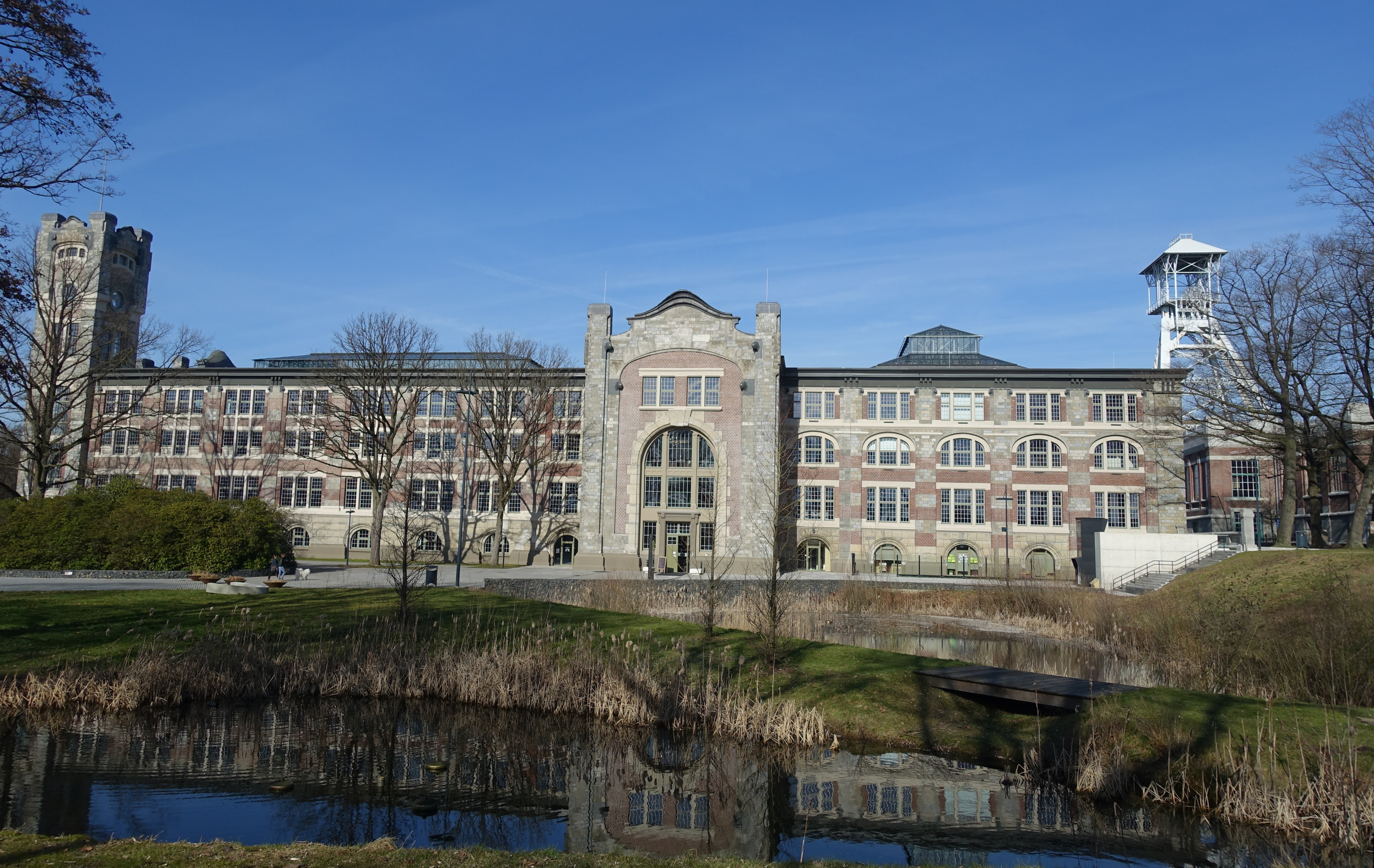 Steenkoolmijn van Waterschei Genk (België); zuidzicht met hoofdgebouw, schachttoren en deel van ophaalgebouw